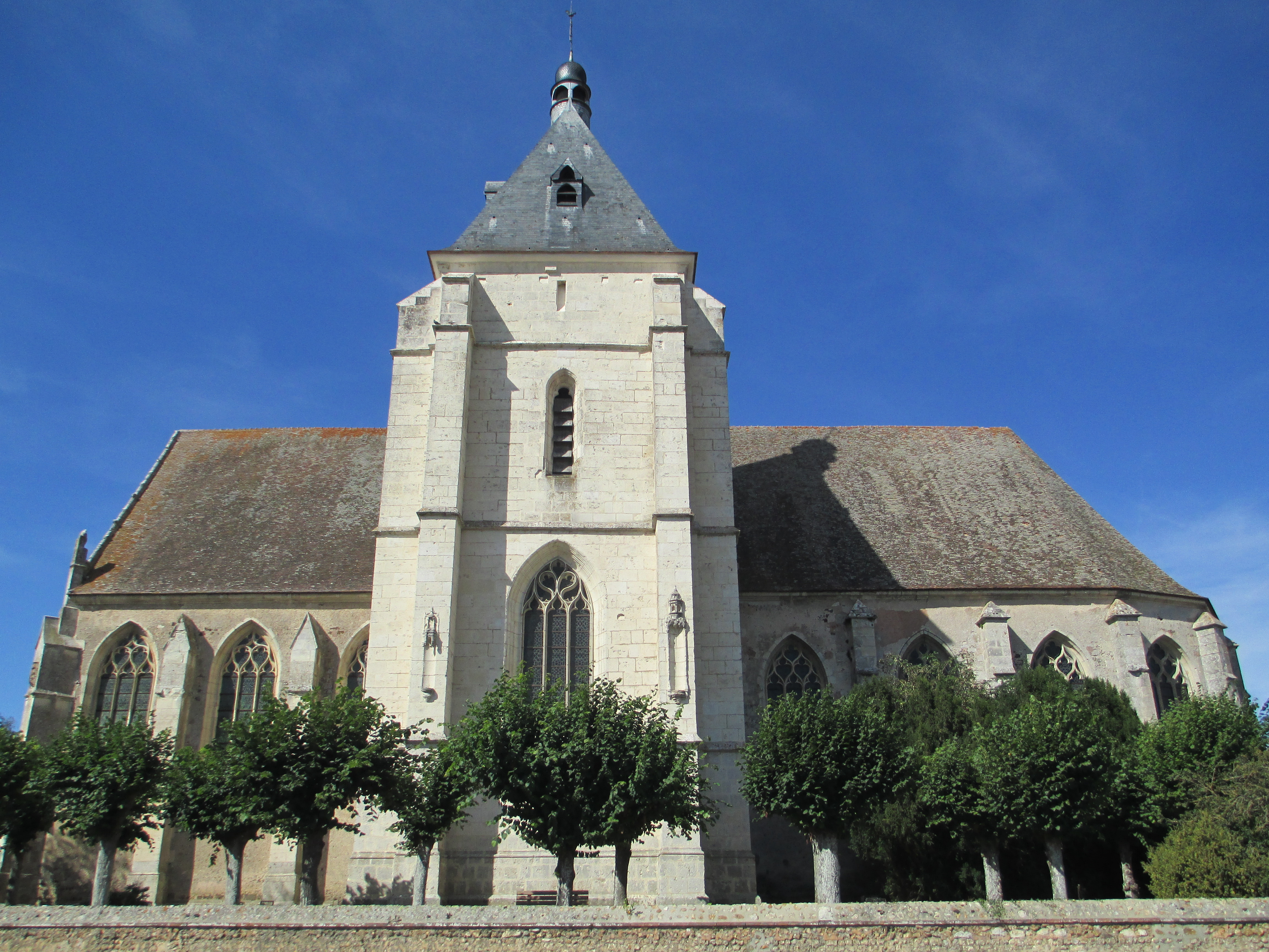 Vue générale de l'église Saint-Pierre de Courville-sur-Eure (Eure-et-Loir). .